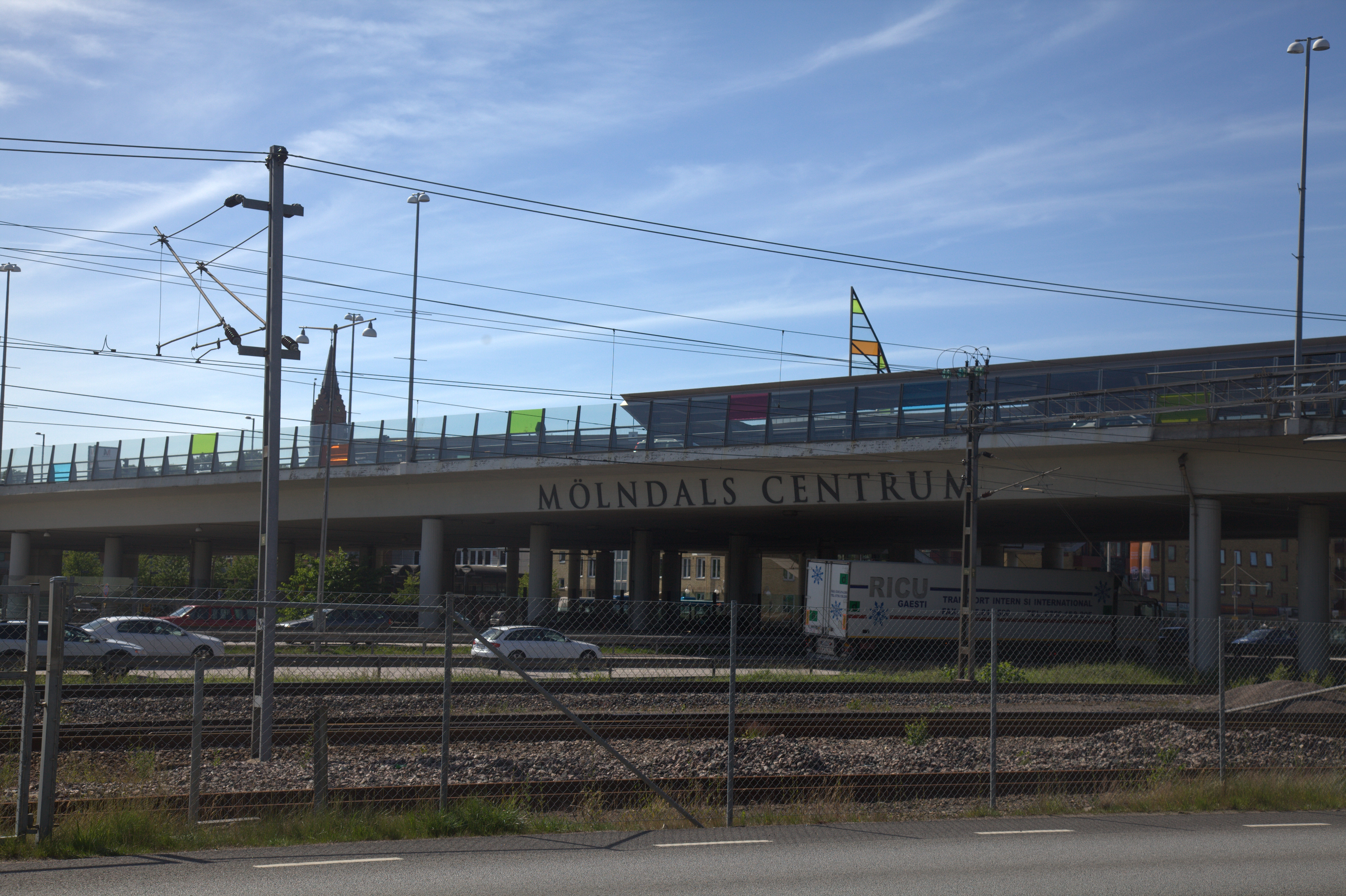 Mölndals bro